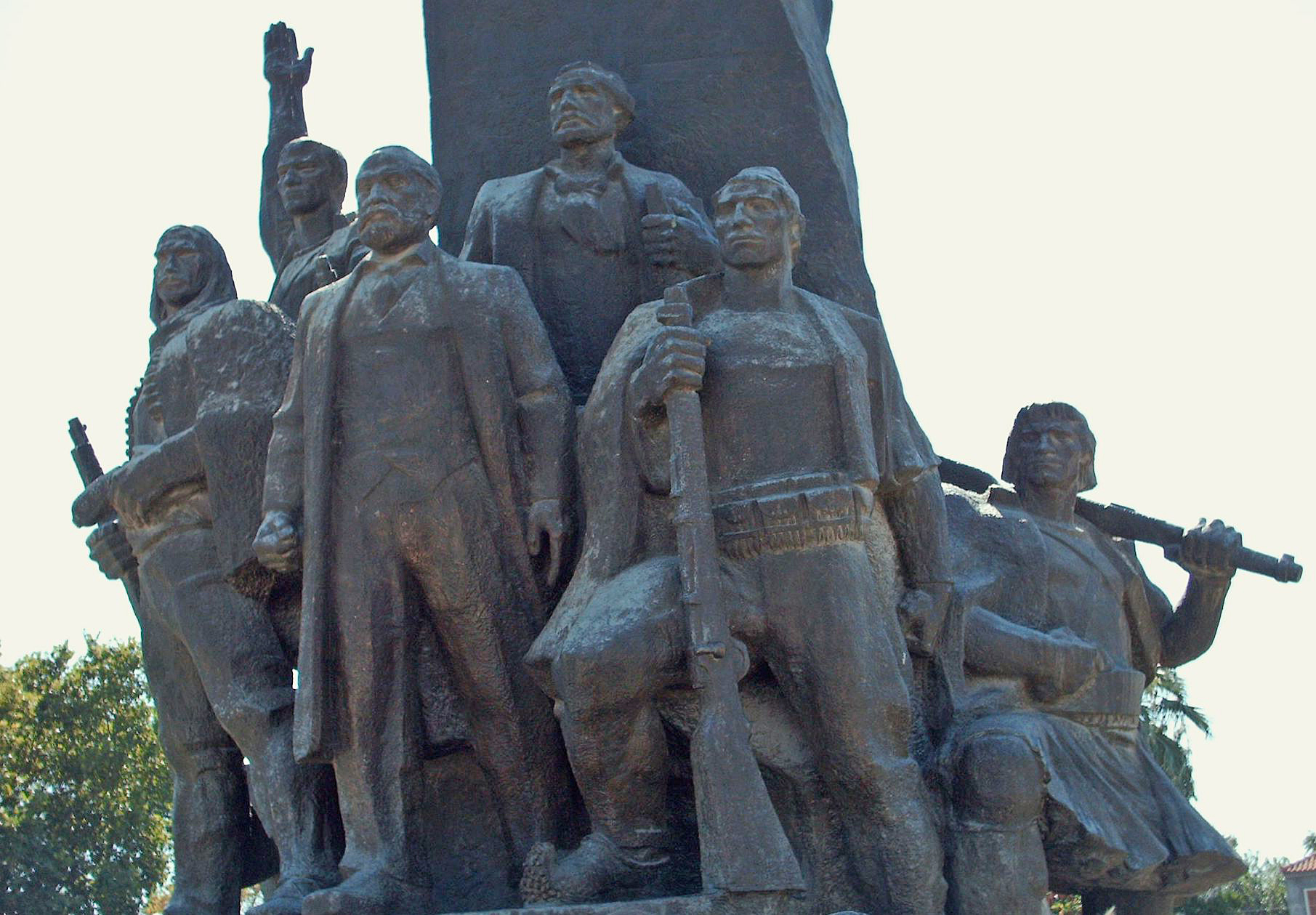 Das Denkmal für die albanische Unabhängigkeit im Stil des sozialistischen Realismus (Detail).